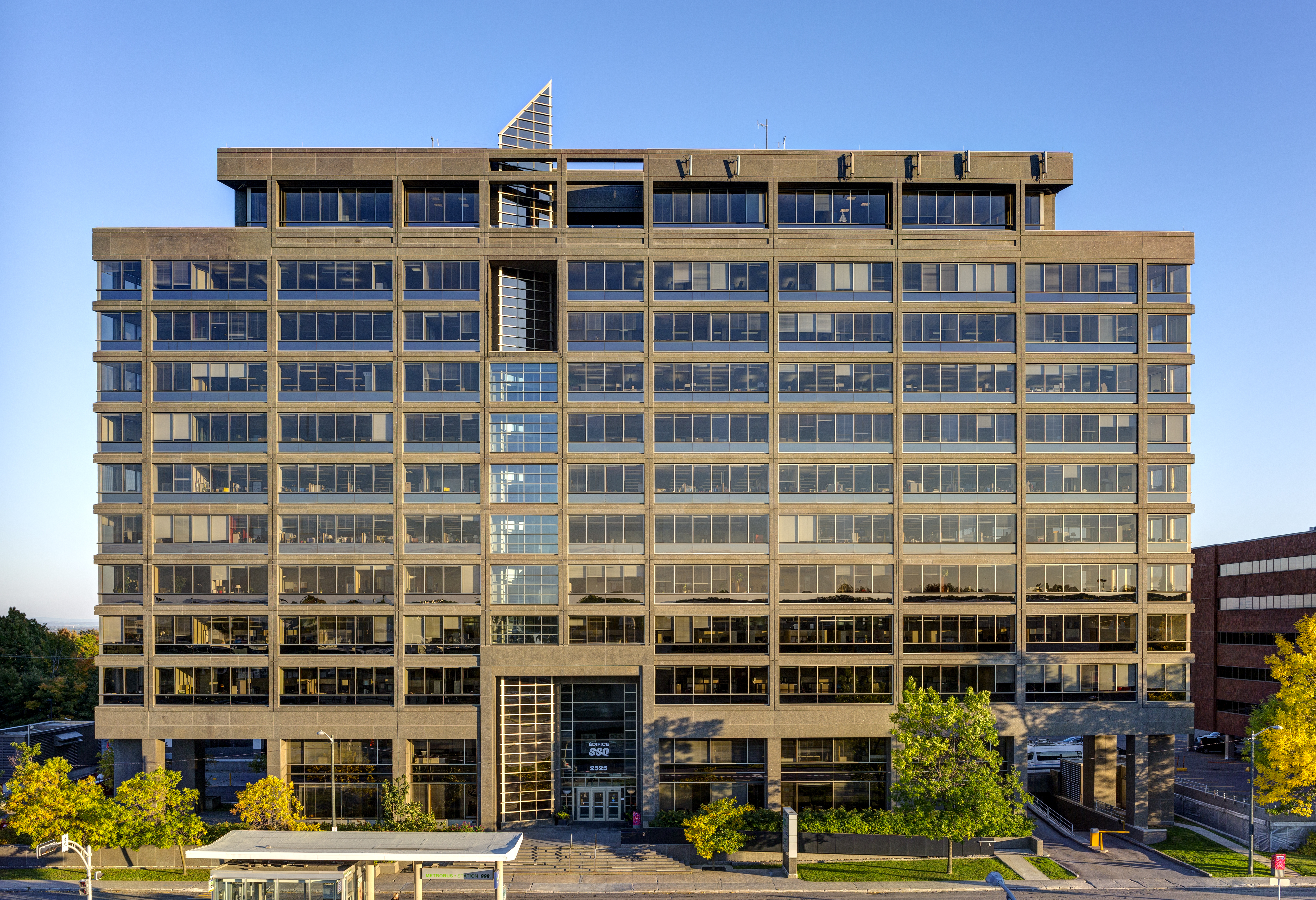 Le siège social de SSQ Groupe financier à Québec.